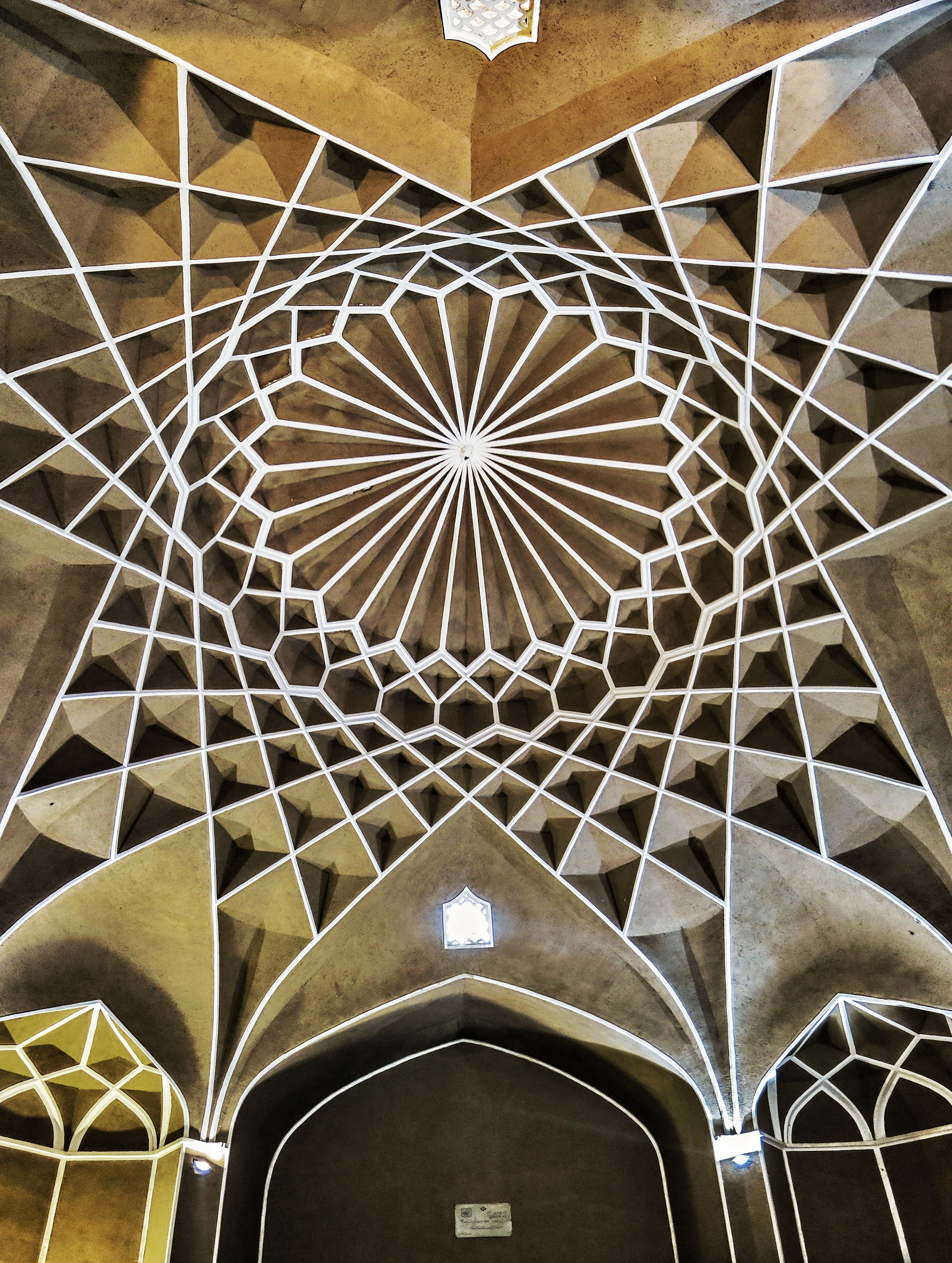 عمارت تاریخی باغ صدری، تفت یزد